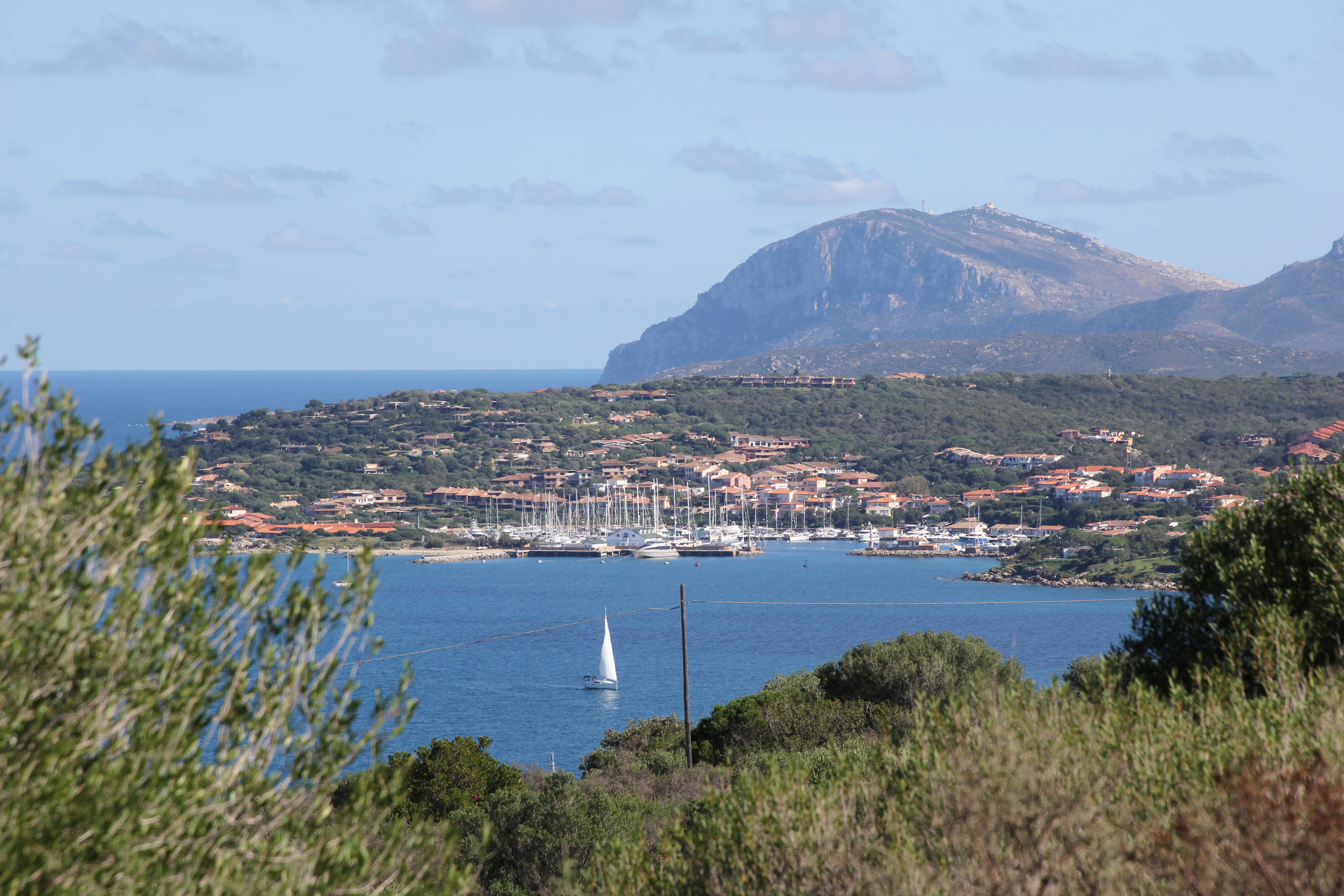 Olbia, frazione Porto Rotondo, panorama